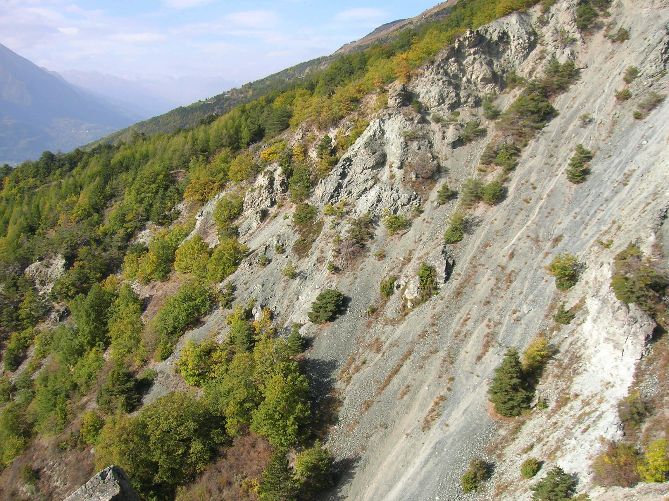 Vista della frana della collina adiacente, che il Vescoz volle arrestare creando l'Arboretum. Arboretum Pierre-Louis Vescoz, Verrayes, Valle d'Aosta, Italia.